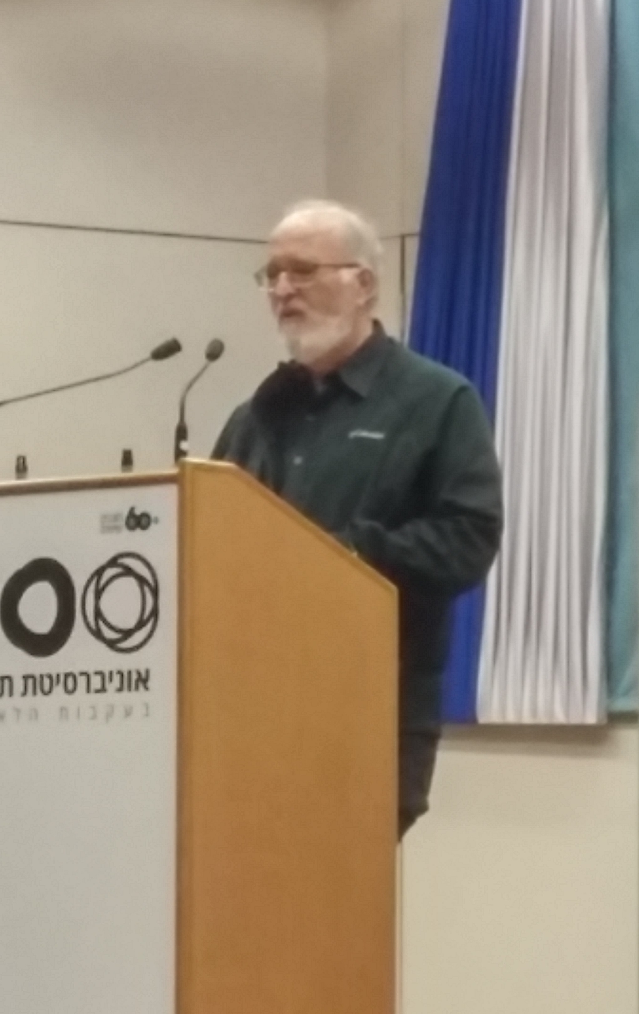 יצחק בן ישראל בהרצאה באוניברסיטת תל אביב